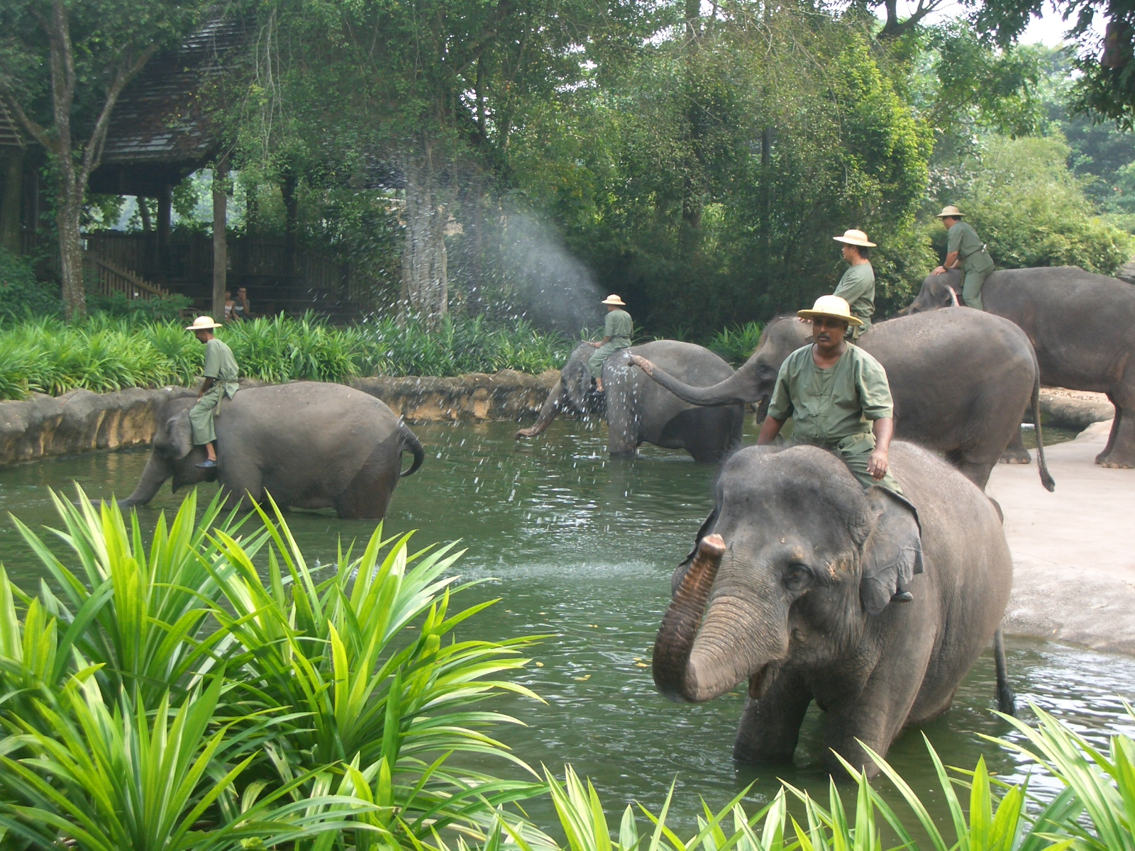 sg zoo elephant